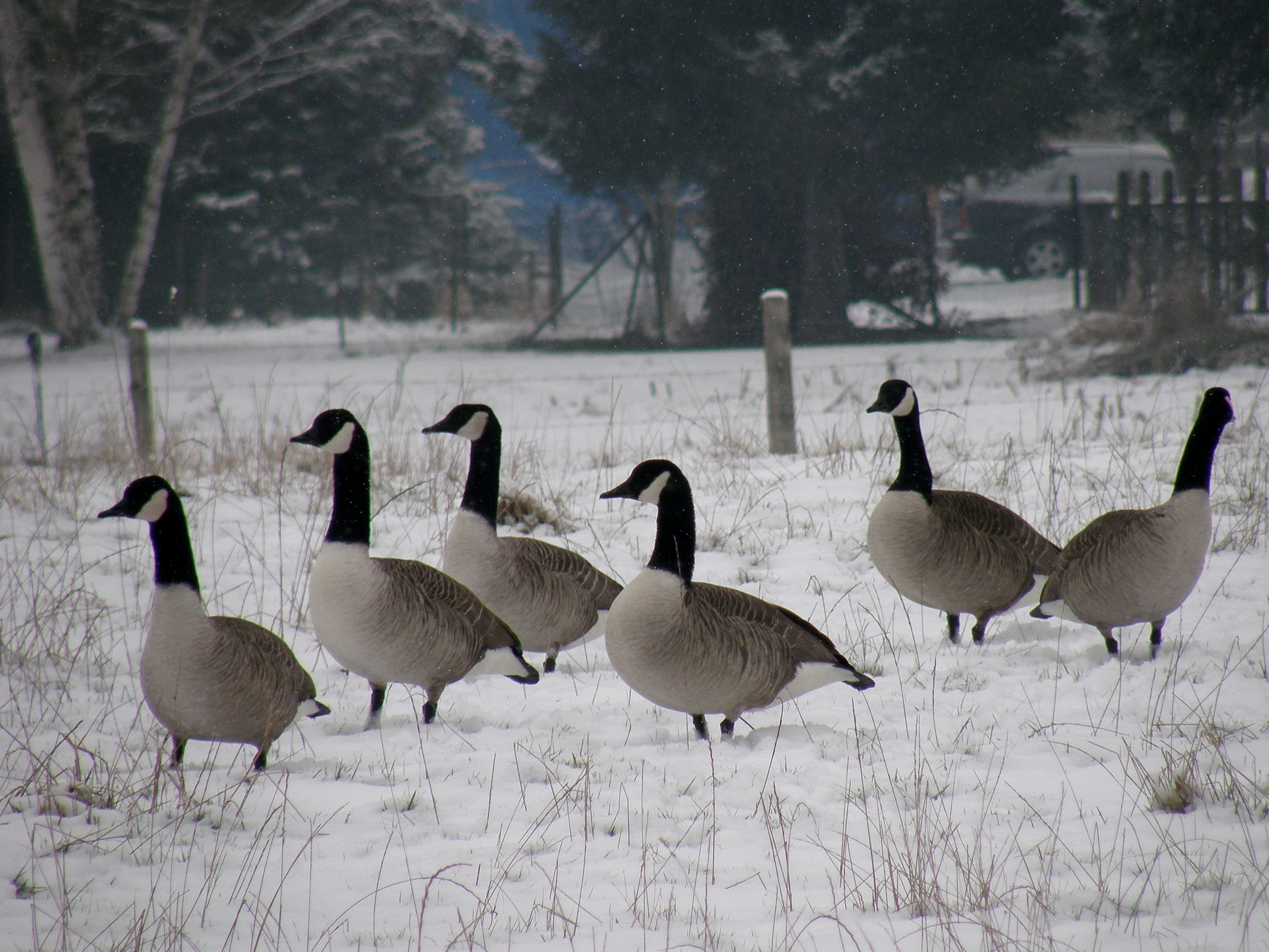 troupe d'oies du Canada au repos. Vallée de la Meuse, Heer, Belgique.